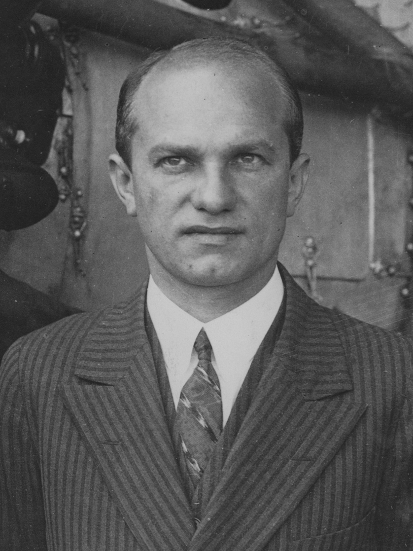 L'aviateur Charles Levine (qui traversa l'Atlantique) qui a été arrêté en Autriche pour complicité dans fabrication de fausse monnaie